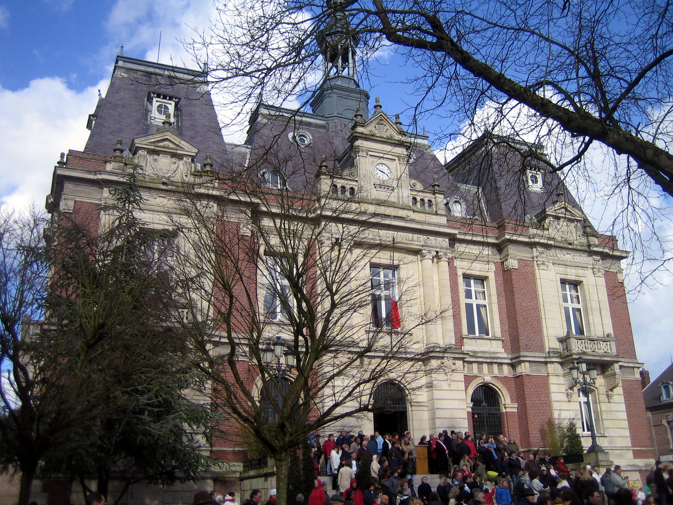 Doullens (Somme), France - Hôtel-de-ville.Le dimanche 18 mars 2007 après-midi, l'escalier est occupé par des "officiels" et des badauds dans l'attente de l'arrivée du géant local "Florimond Long Minton".